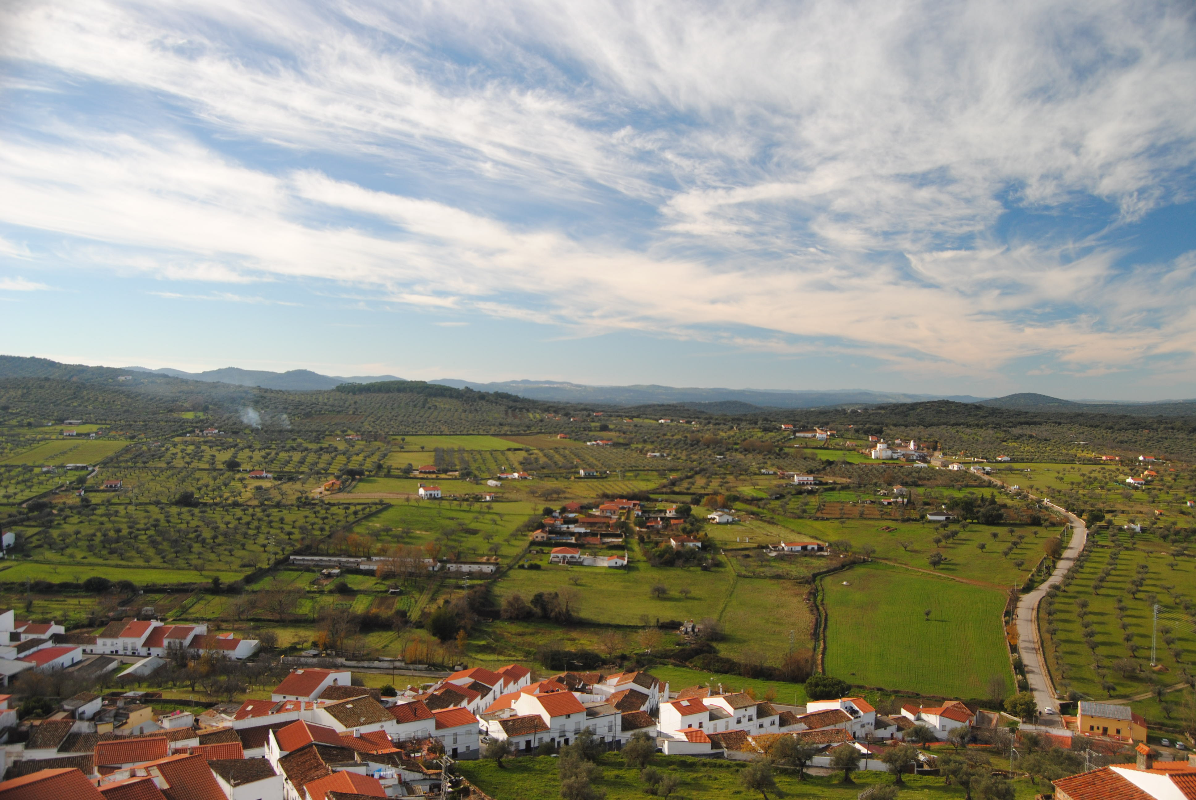 Segura de León, provincia de Badajoz, Extremadura, España.